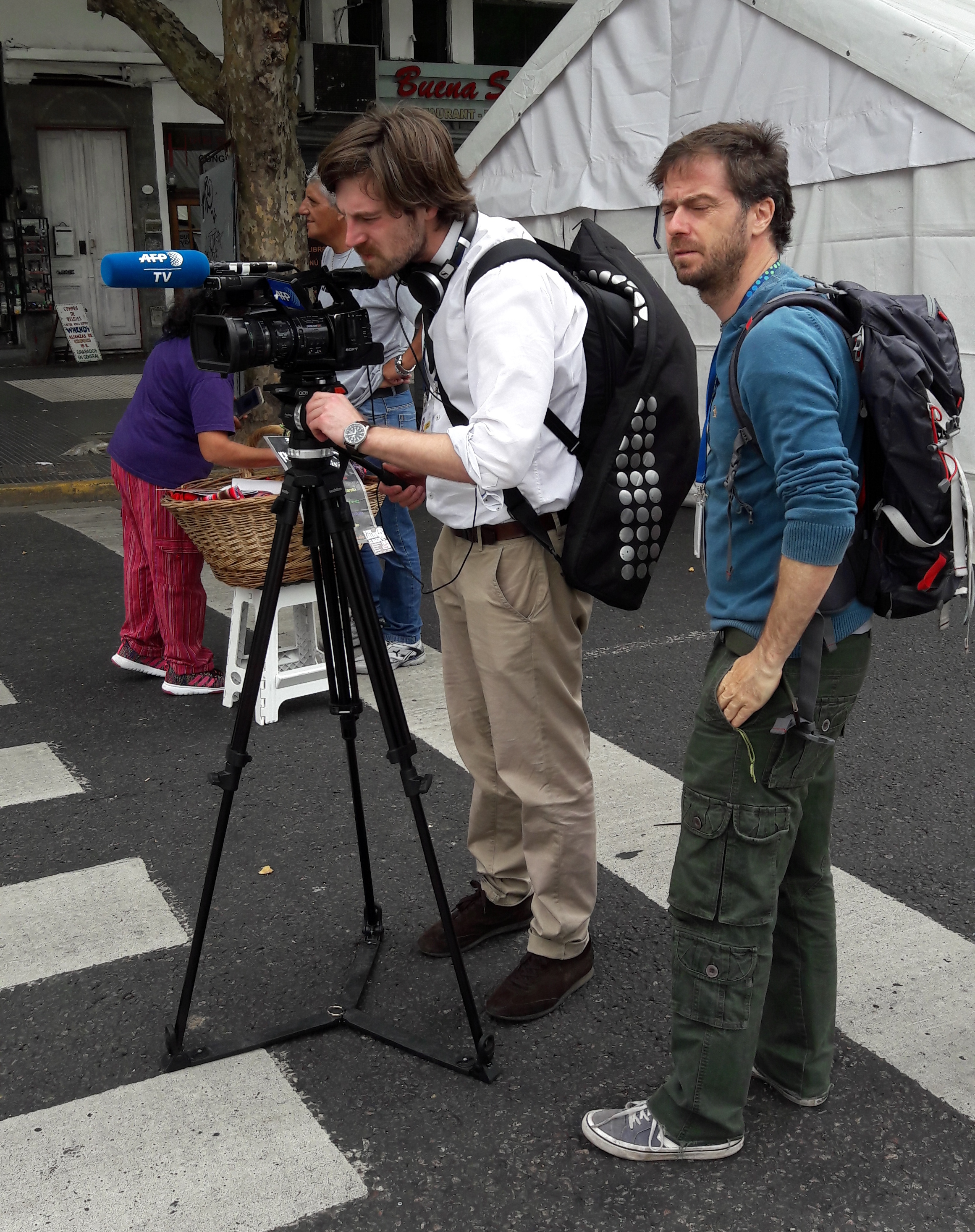 Manifestación contra el G20 y el FMI en Buenos Aires.